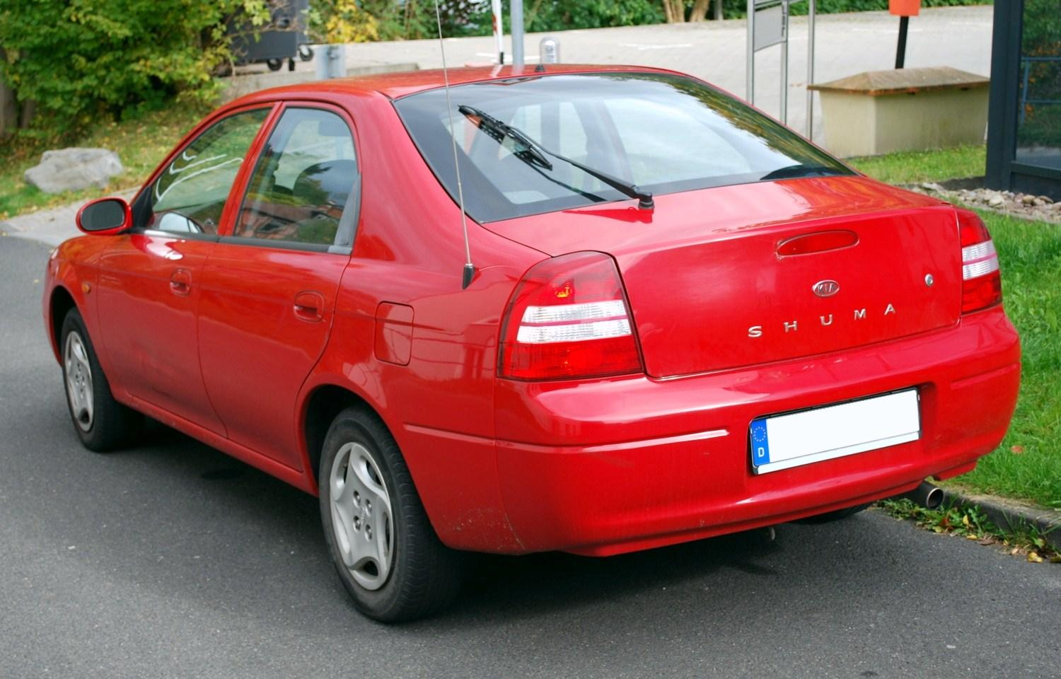 Kia Shuma